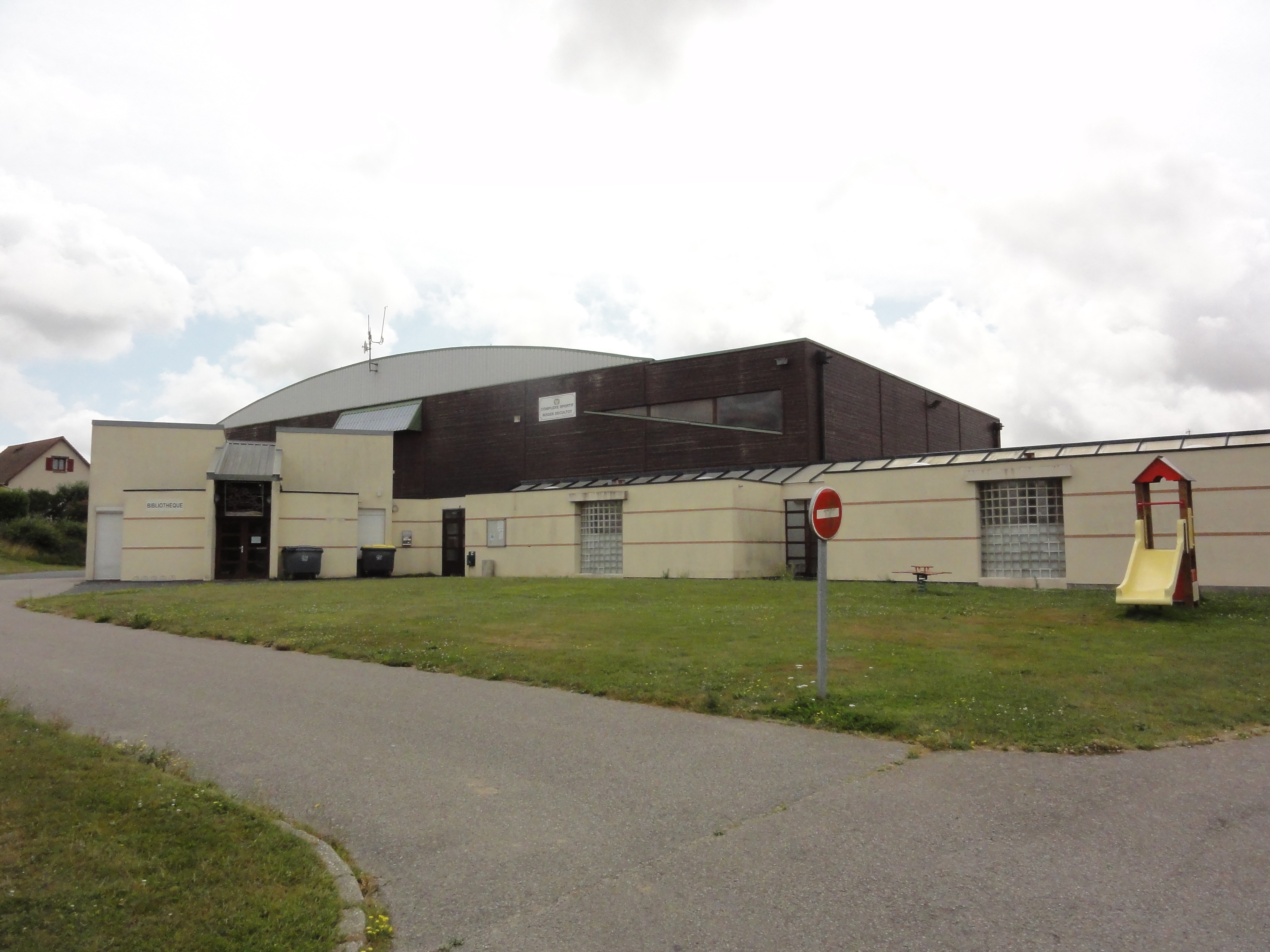 Saint-Sauveur-d'Émalleville (Seine-Mar.) complexe sportif